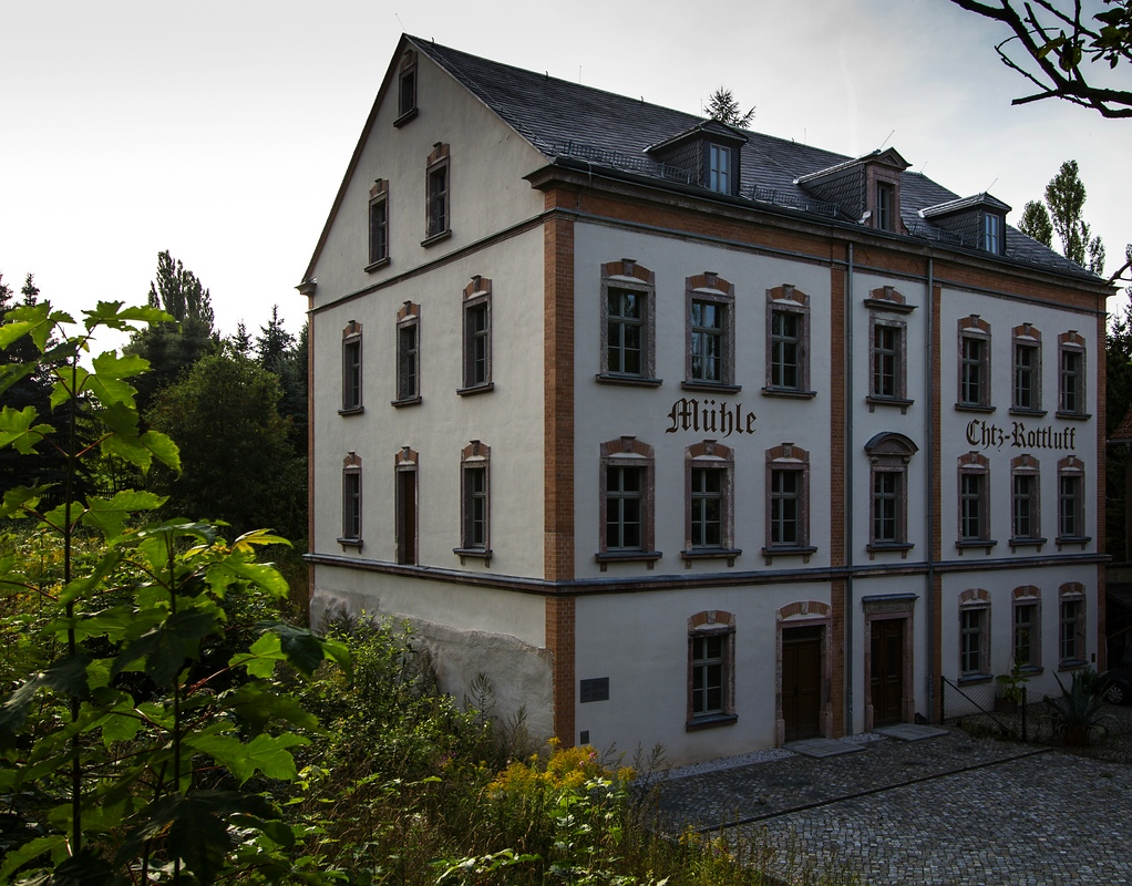 Chemnitz, Limbacher Straße 380: Mühle. Rechts stand das (nun abgerissene) Geburtshaus von Karl Schmidt-Rottluff